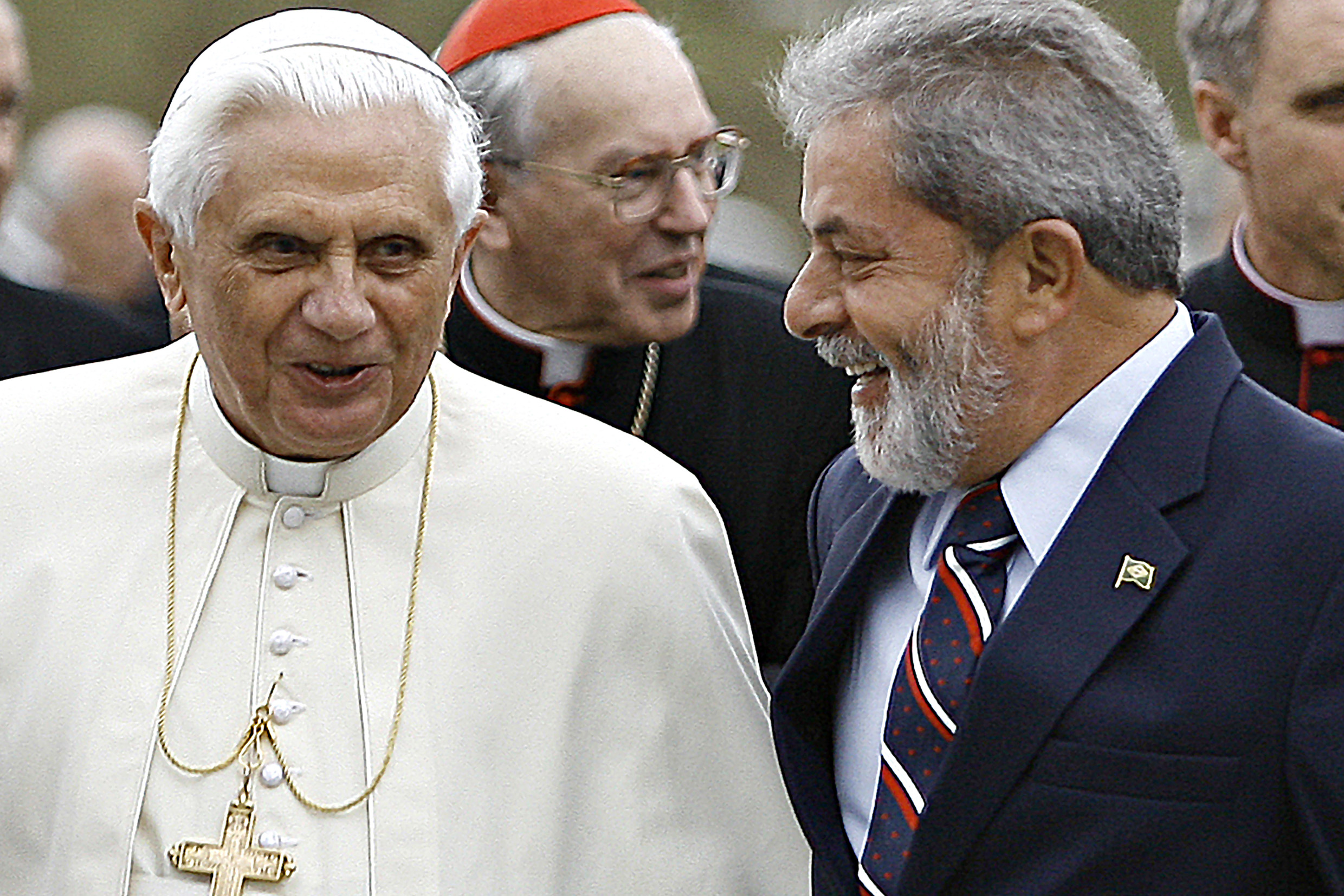 Bento XVI chega a São Paulo e é recebido pelo presidente do Brasil, Luís Inácio Lula da Silva.